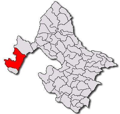 Categorie:Hărţi ale judeţului Mehedinţi